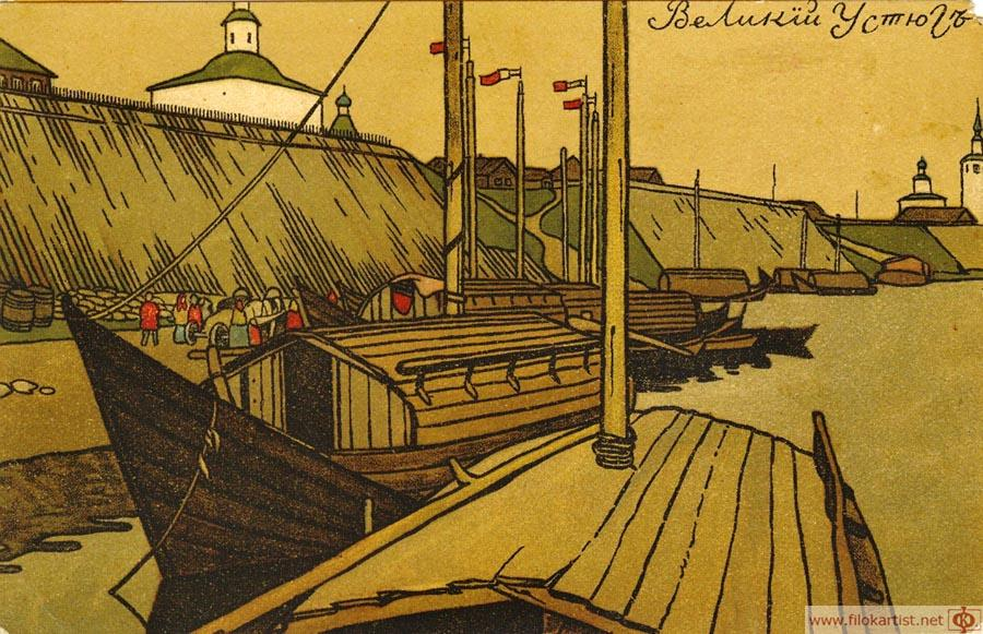 Великий Устюг Билибин Иван Яковлевич Издание Общ. Св. Евгении